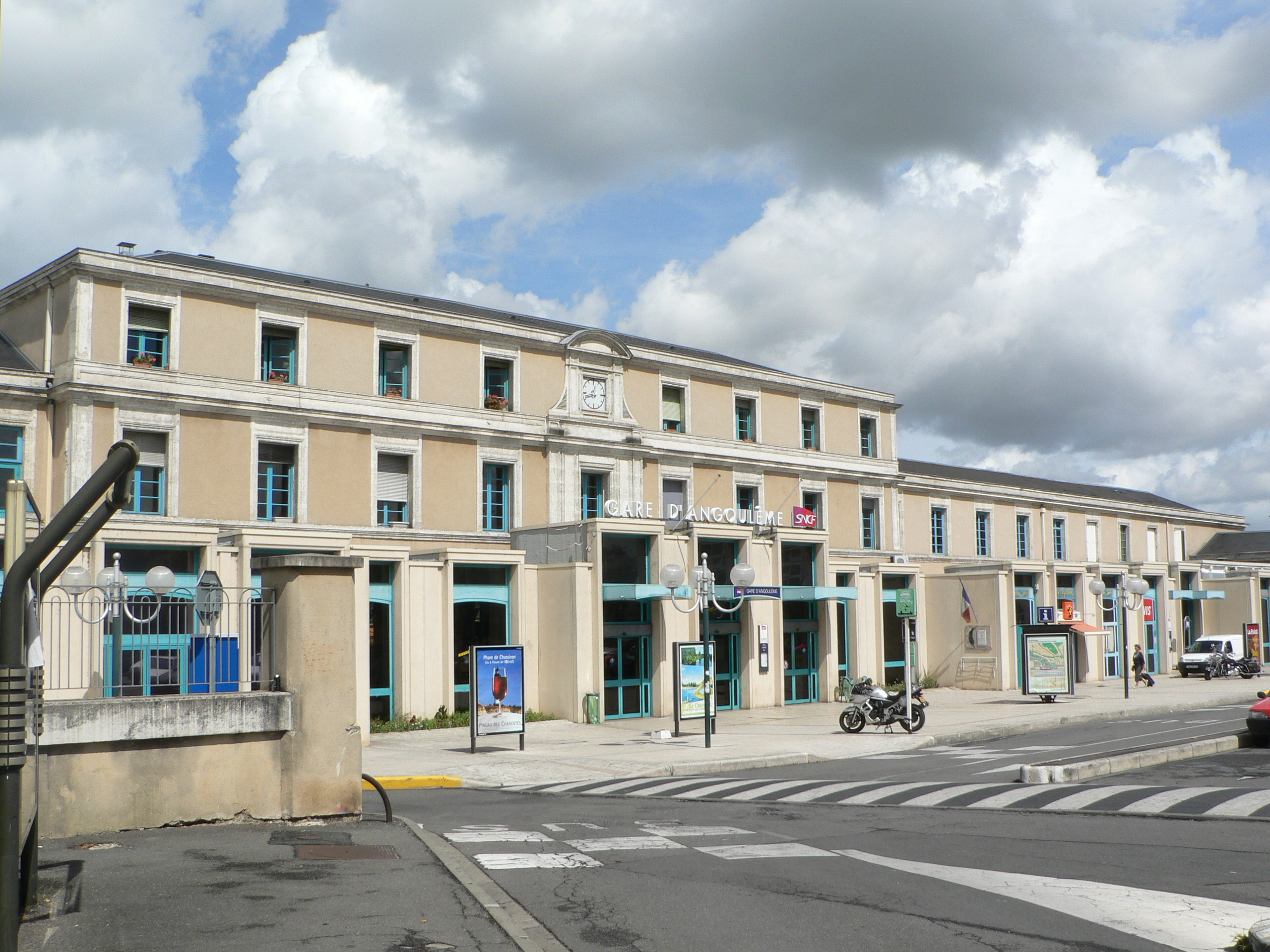 Gare d'Angoulême (Charente, France).